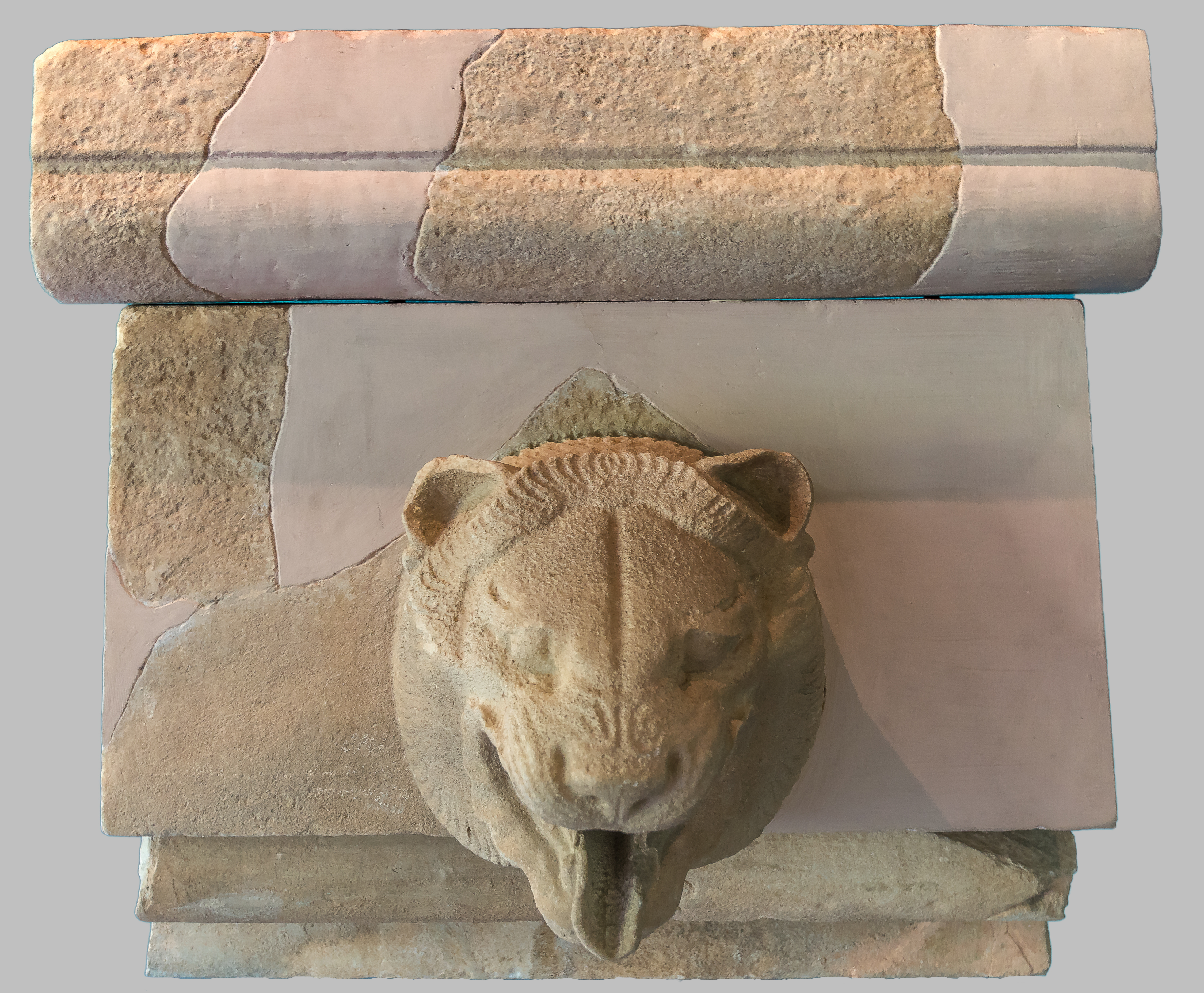 Ein Abtropfstein in Löwenkopfform vom Athenatempel, ausgestellt im Museo Archeologico Regionale Paolo Orsi